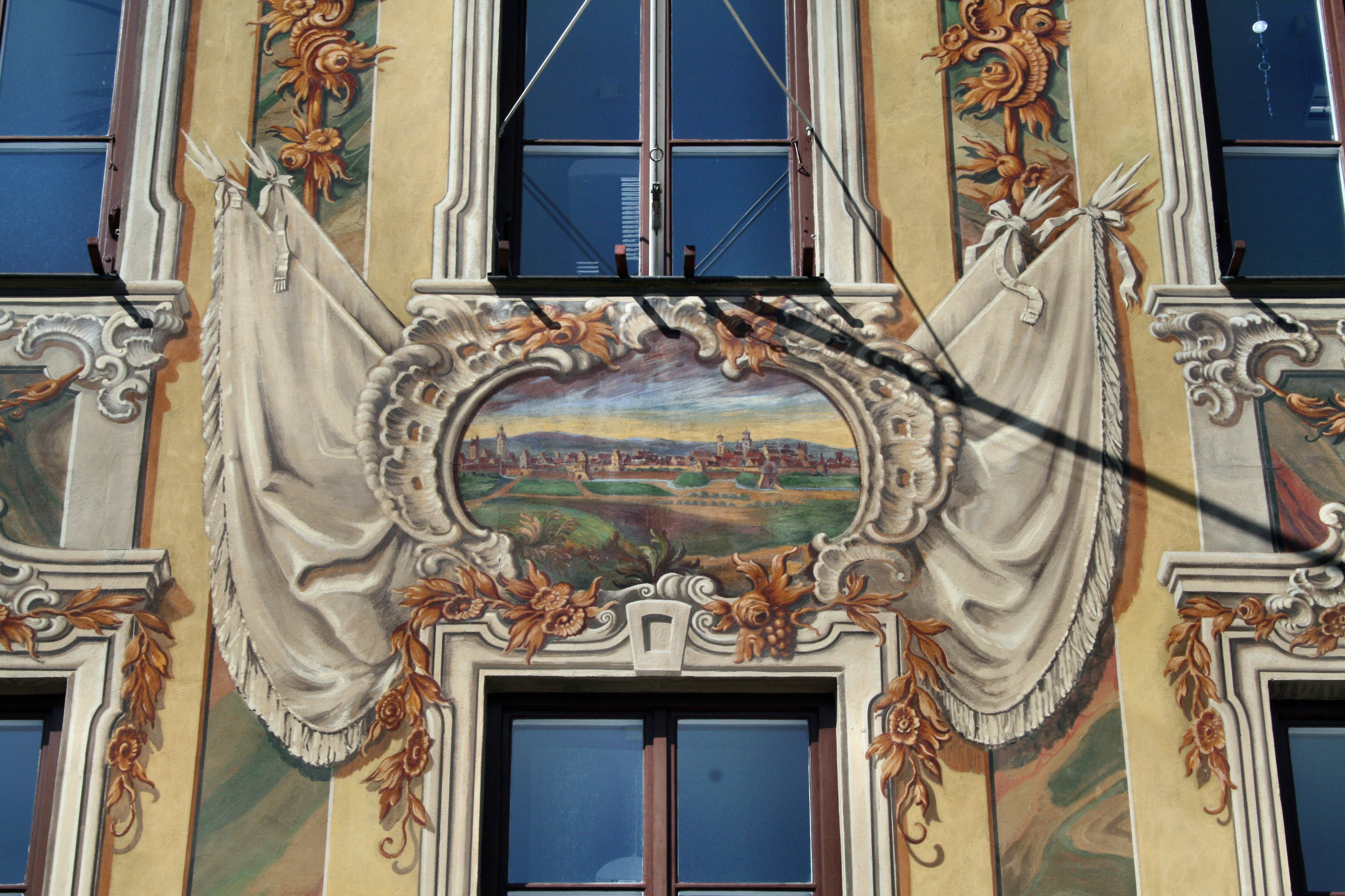 Gemälde der Stadt Memmingen am Steuerhaus